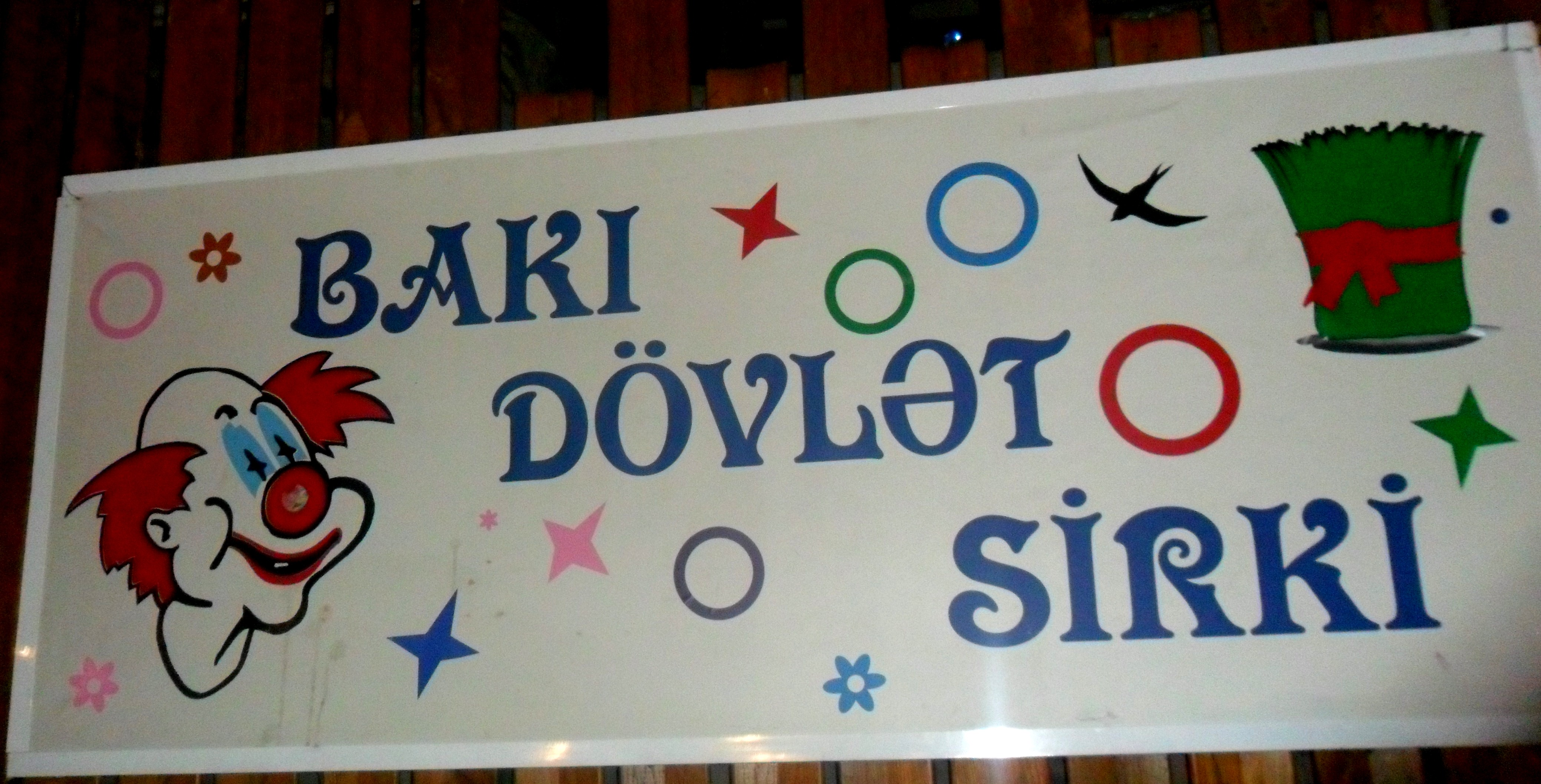 Bakı Dövlət Sirki